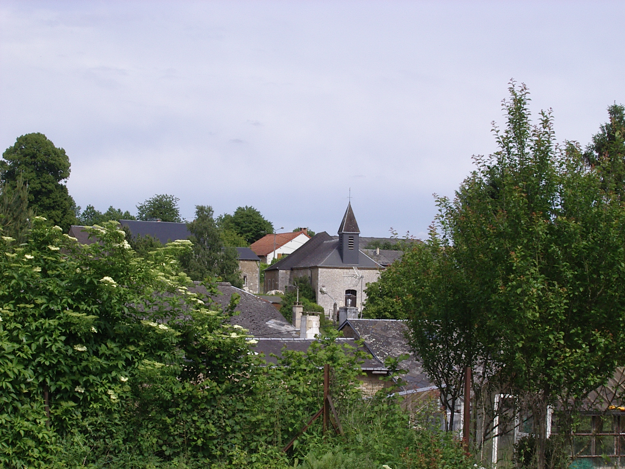 Barbaise est une commune française, située dans le département des Ardennes et la région Champagne-Ardenne